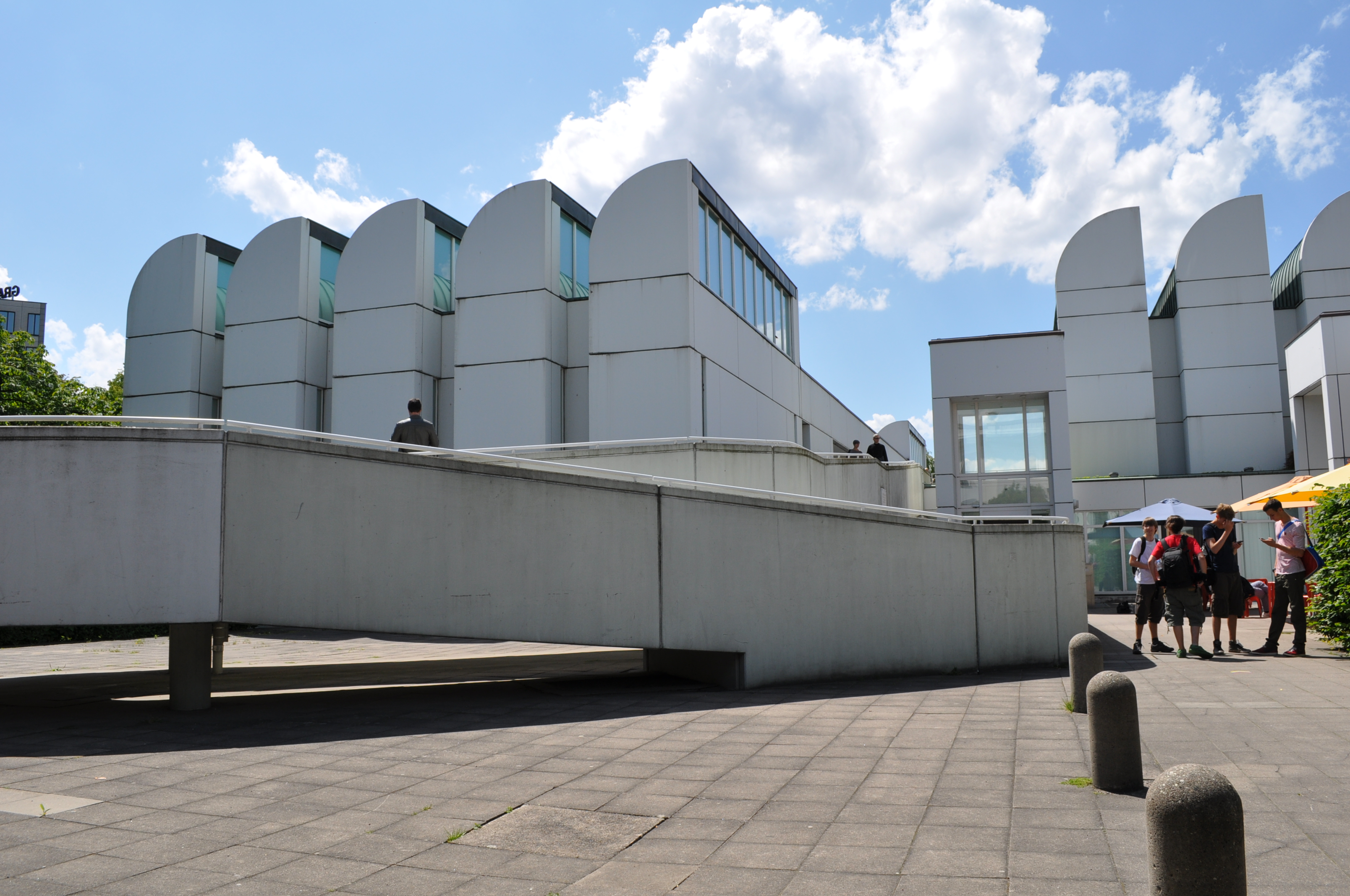 1976-79 von Alexander Cvijanovic und Hans Bandel nach Plänen von Walter GropiusThis is a photograph of an architectural monument.